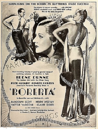 Pubblicità del film "Roberta", 1935